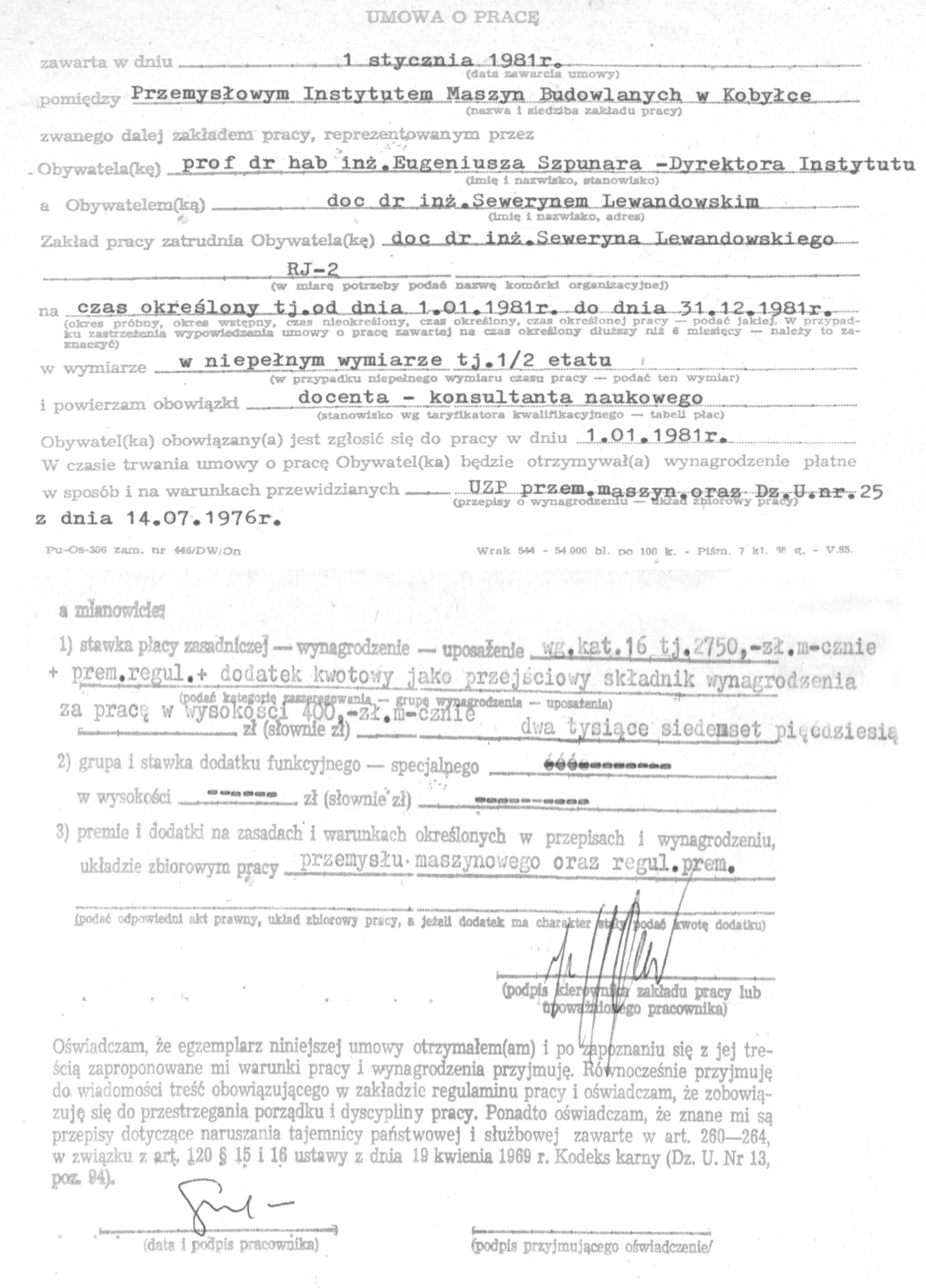 Poświadczenie zatrudnienia w Przemysłowym Instytucie Maszyn Budowlanych do 1981 r.